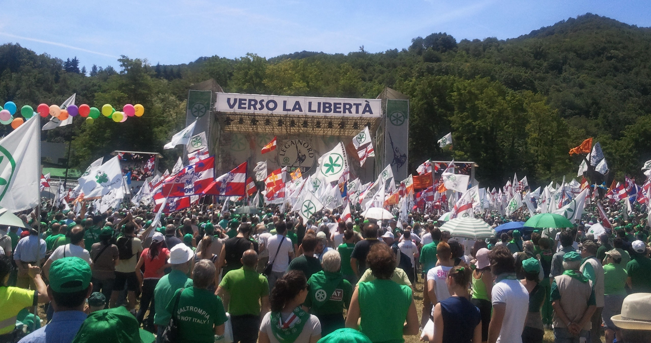 Immagine del pubblico e del palco dell'annuale raduno della Lega Nord a Pontida.